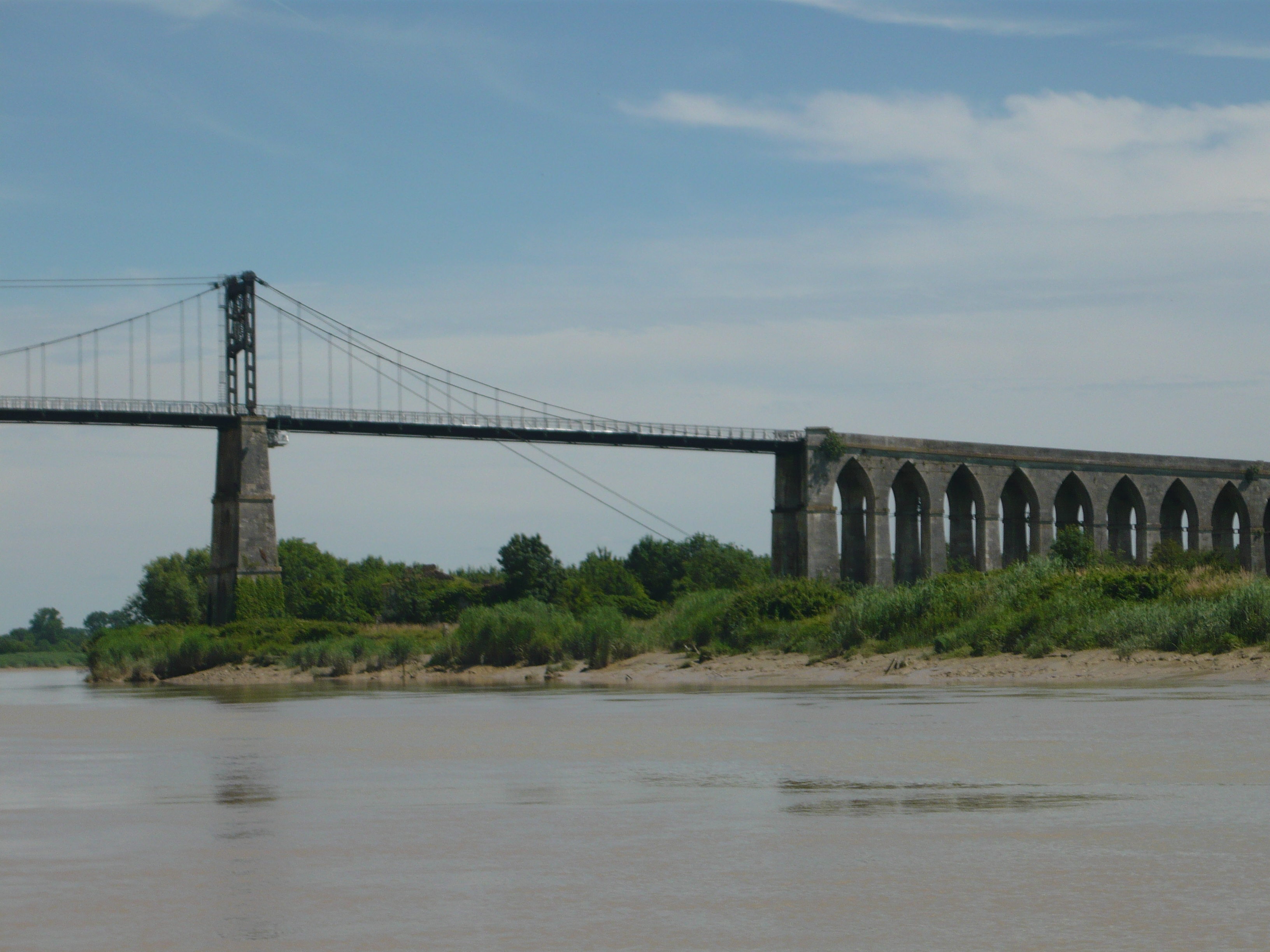 La troisième pile du pont de Tonnay-Charente ou pile de la rive gauche précédée des 51 arches ogivales en maçonnerie (17).